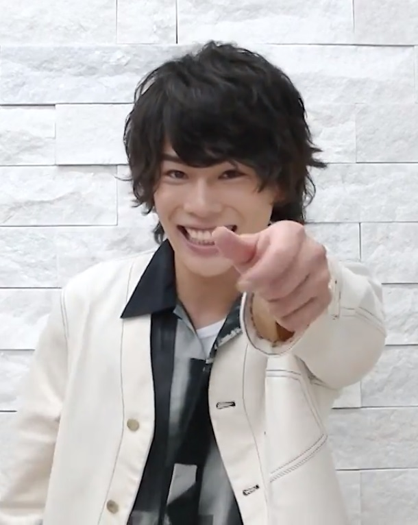 飯山裕太（俳優）